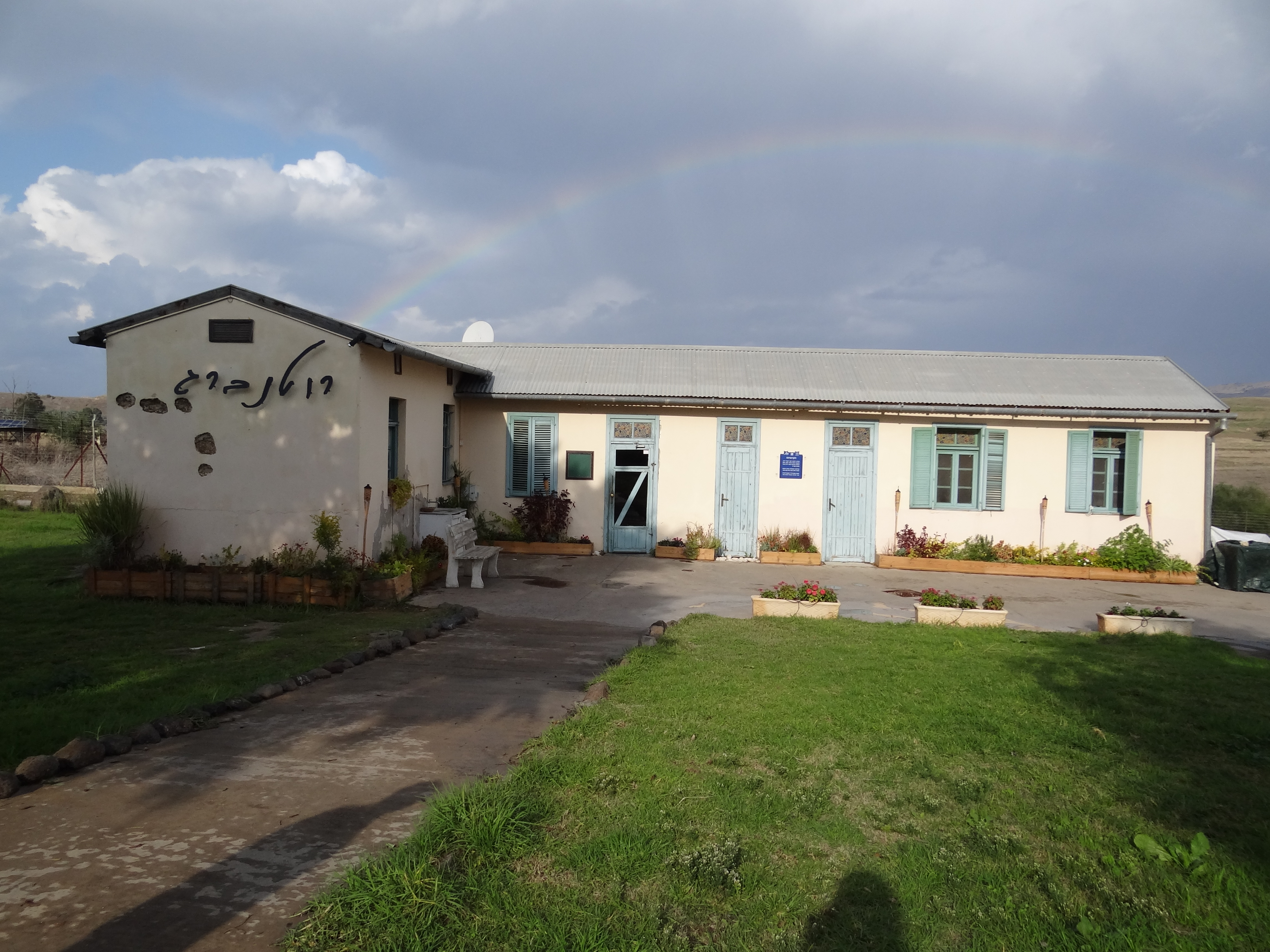 Old Gesher. In 1939 a kibbutz settle in the area. It called Gesher. The member of the kibbutz defended this palce and the police station in 1948 חצר גשר הישנה. במקום הייתה התיישבות בשנות העשרים של המאה העשרים. המתיישבים הקימו בשנת 1936 את קיבוץ אשדות יעקב. בשנת 1939 התיישבה קבוצה שהקימה את קיבות גשר. היא הגנה על המקום במלחמת העצמאות. היישוב הותקף על ידי בצבא העירקי נהרס אבל לא נכבש הקרנטינה. היום משמש כמסעדה